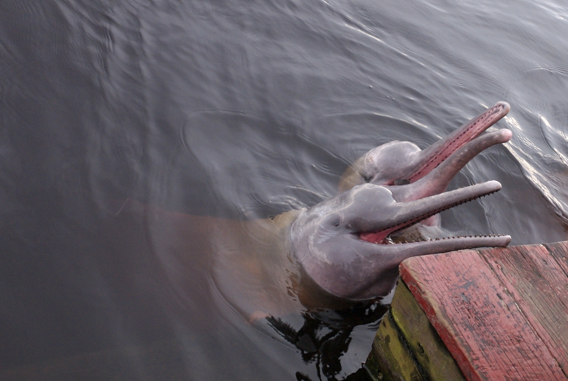 Delfines rosados en el río Negro, Anavilhanas archipelago